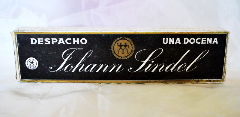 Caixa de lápis Johann Sindel Hispania